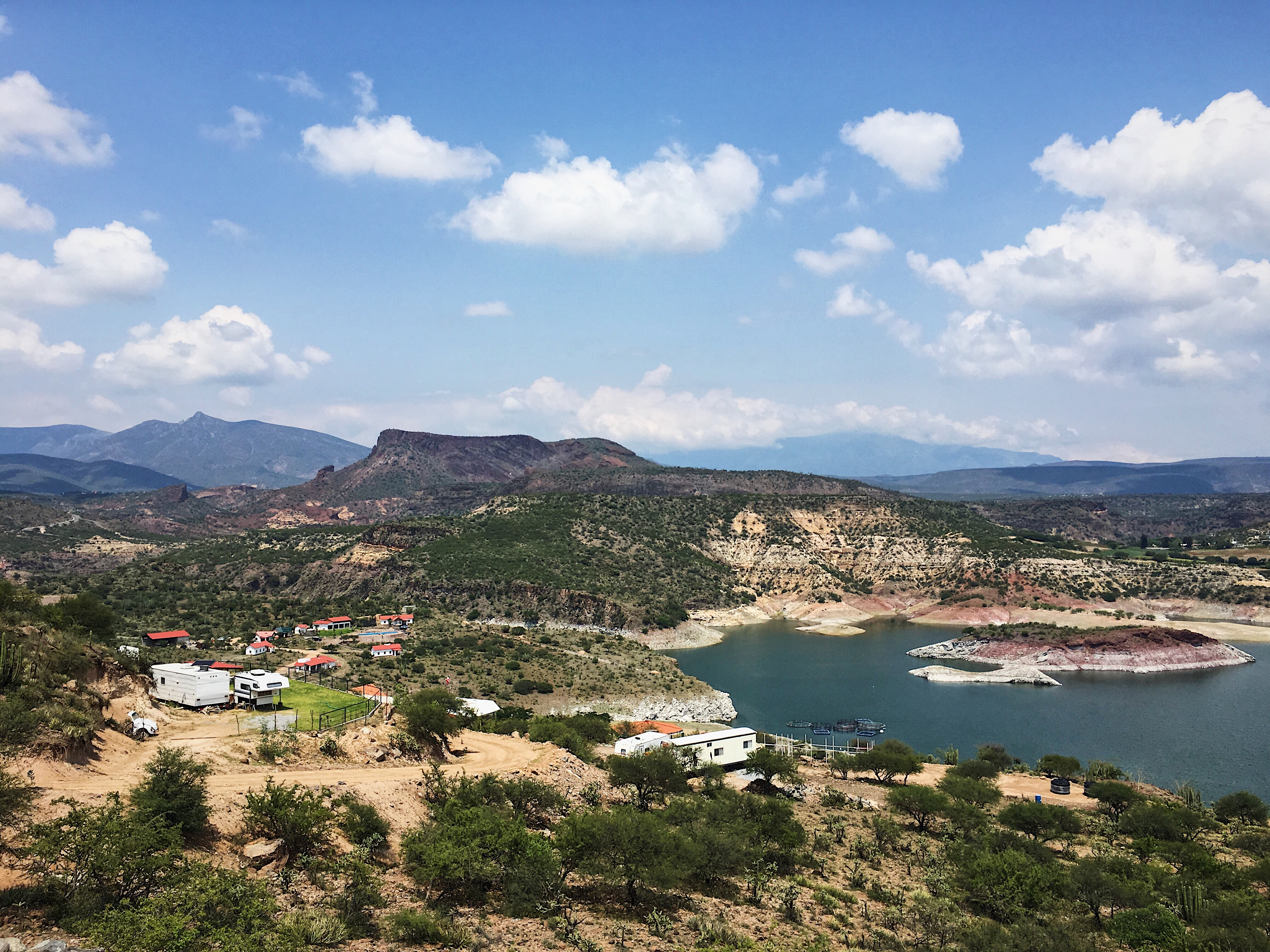 Vista hacia las cabañas a la orilla de la presa de Zimapán, Xodhé Querétaro